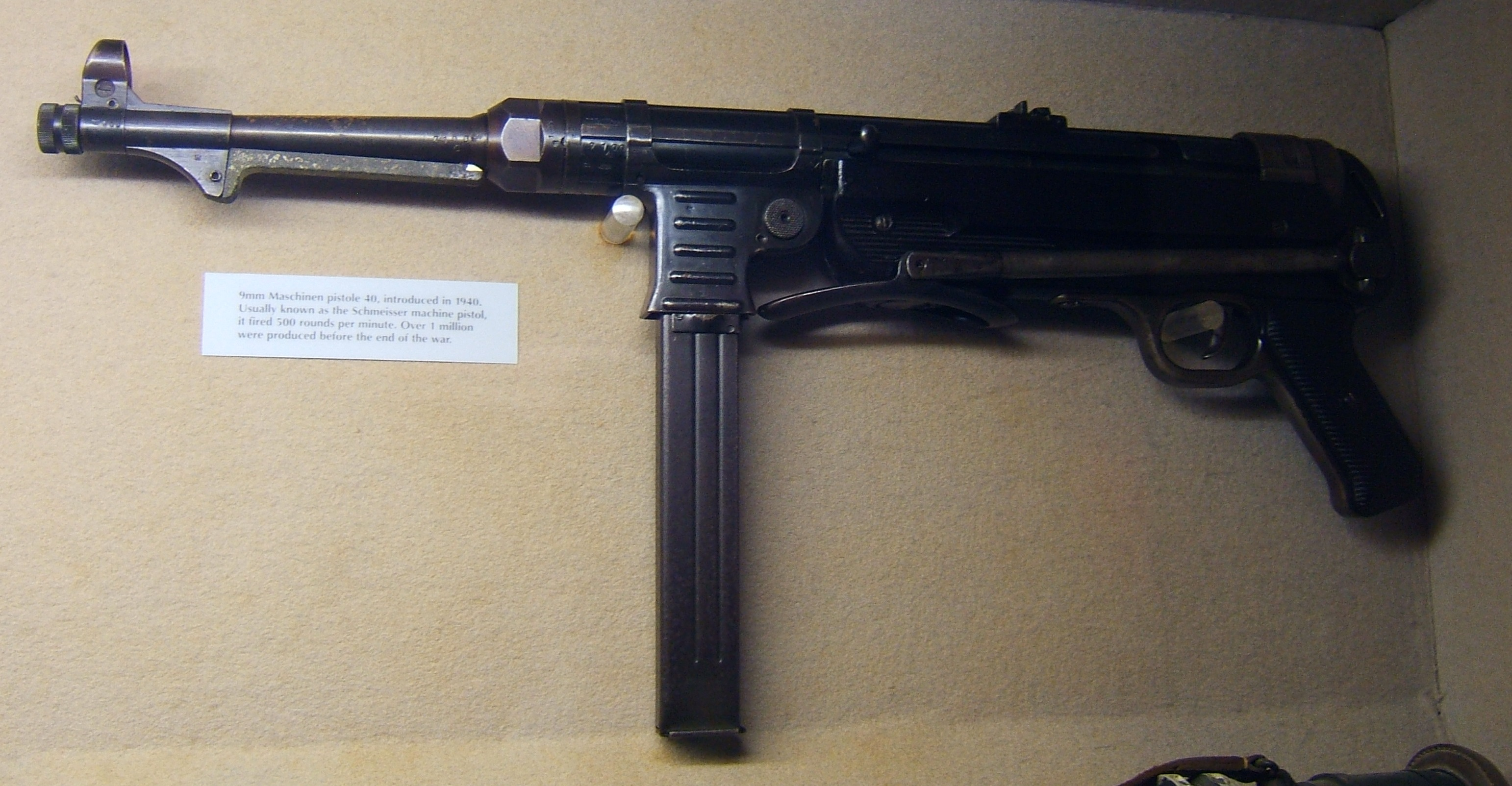 Maschinenpistole MP40, l'arme qui a fait amputer la jambe gauche de Raphaël Onana.